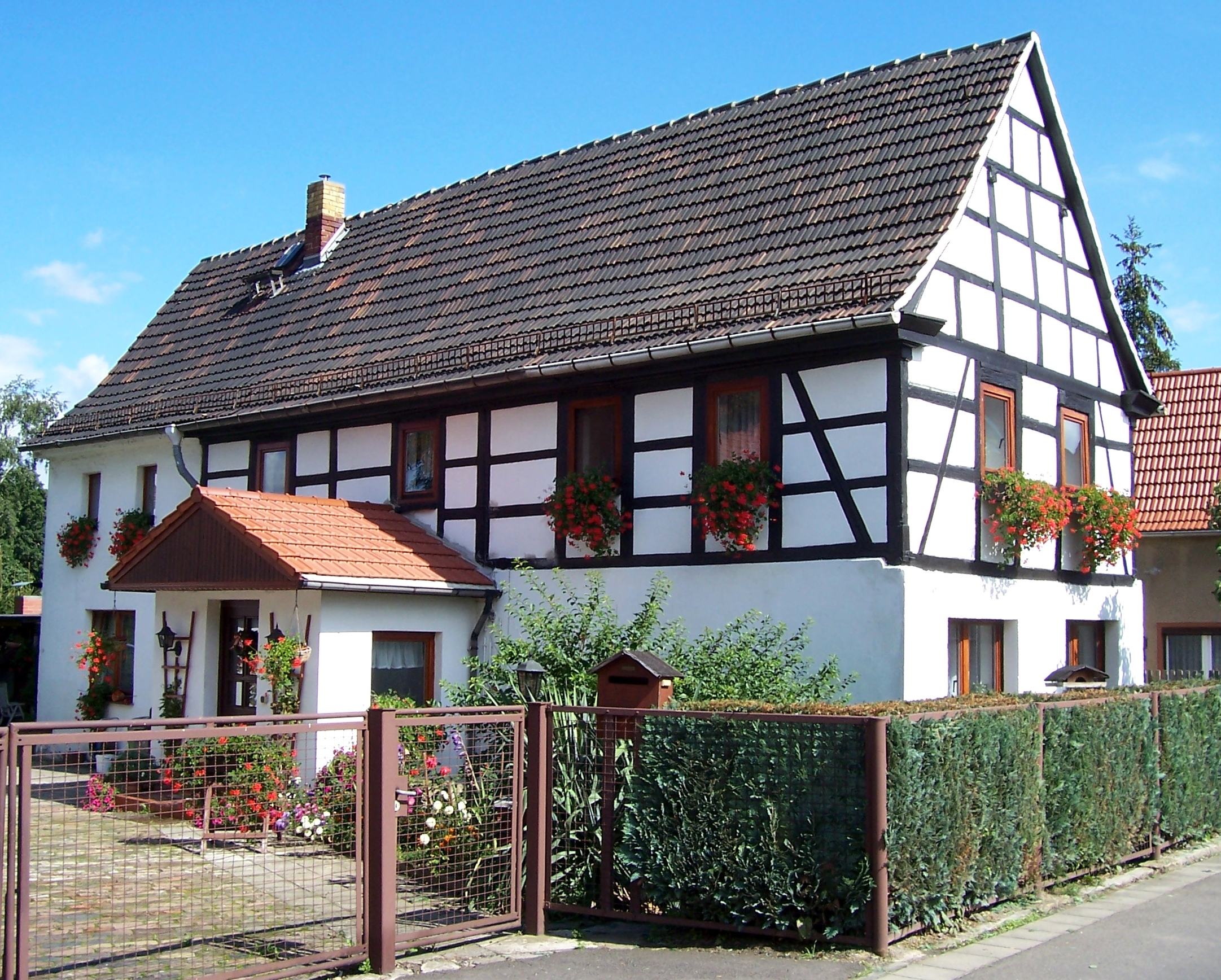 Fachwerkhaus in Elstertrebnitz OT Eulau (Deutschland)